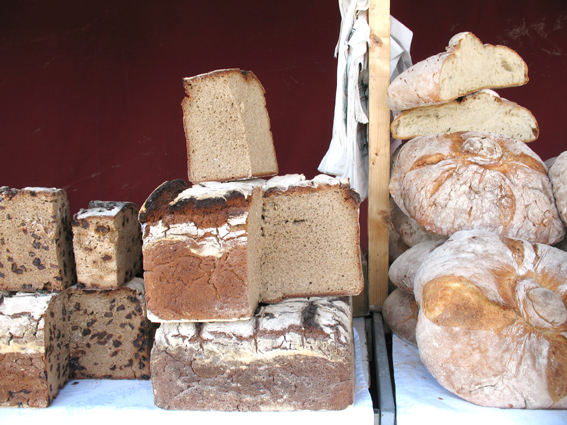 Pan de millo e de trigo Pan de Galiza. VI festa da filloa da pedra. 2009. A Baña